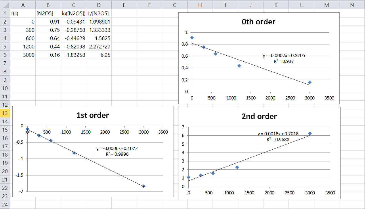 시간에 따른 [N2O5], ln([N2O5]), 1/[N2O5] 값과 그래프, 추세선, r제곱 값을 엑셀 프로그램에서 플로팅함